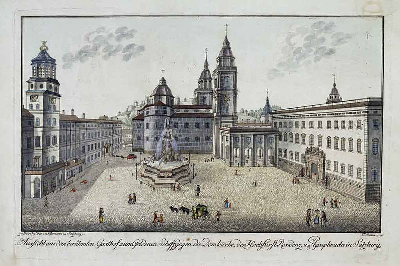 Der Residenzplatz, um 1791; Salzburg-Museum